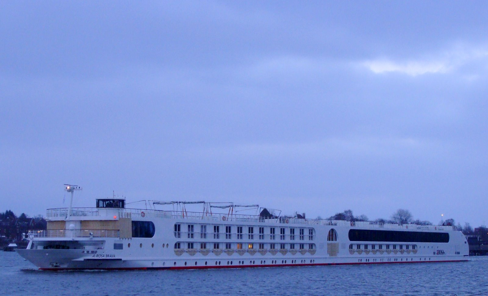 Flusskreuzfahrtschiff A'Rosa Brava auf dem Nord-Ostseekanal in Kiel-Holtenau auf Überführungsfahrt von der Neptun-Werft in Rostock-Warnemünde nach Frankfurt am Main. Dort wird das Schiff, nachdem die Restarbeiten durchgeführt worden sind, am 1. April 2011 getauft und in Dienst gestellt.